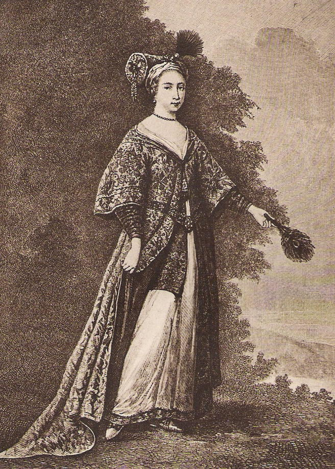 Marie Champmeslé, d'après un portrait anonyme exposé en 1878 au Trocadéro, publié par Emile Mas (La Champmeslé, Paris, Alcan, 1932).